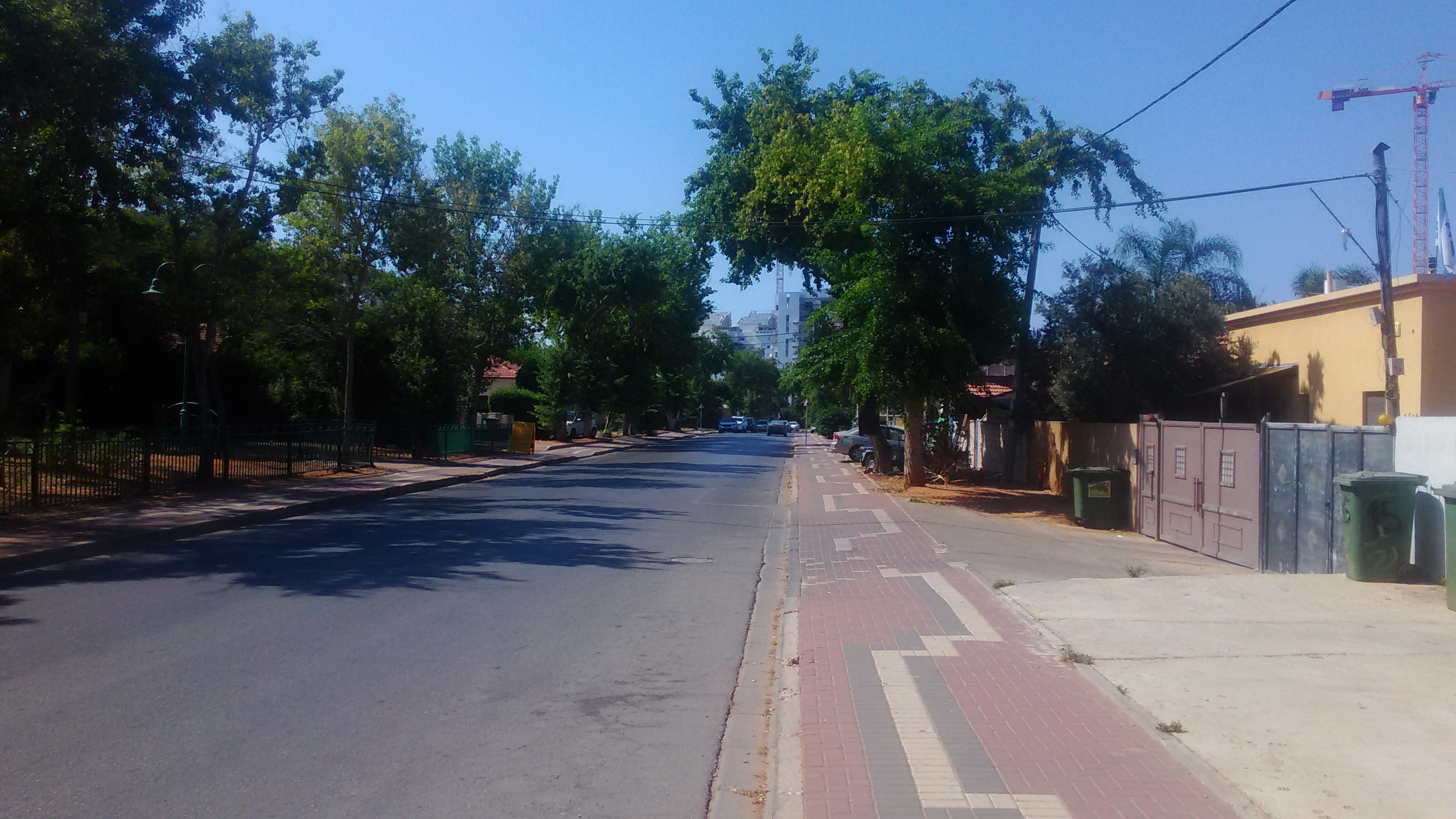 רחוב העצמאות בבית אליעזר. ברקע:בתי שכונת אחוזת דניה